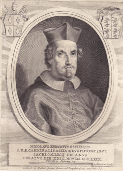 Cardinale Niccolò Acciaiuoli (1630-1719)